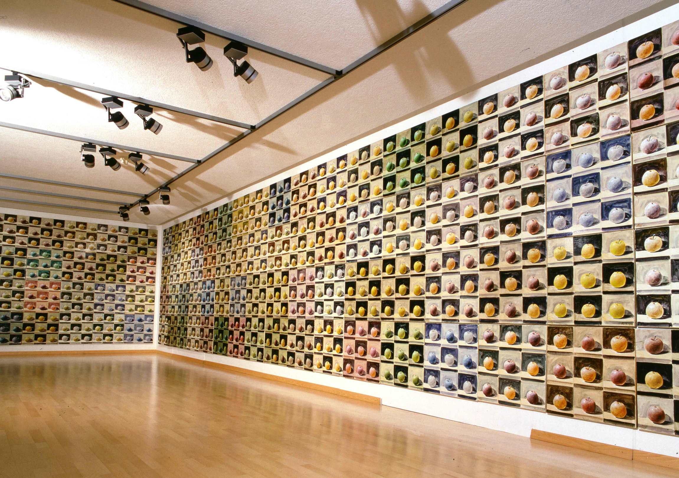 Bild ist von der Installation im Kunsthaus Grenchen von Andreas Schiller